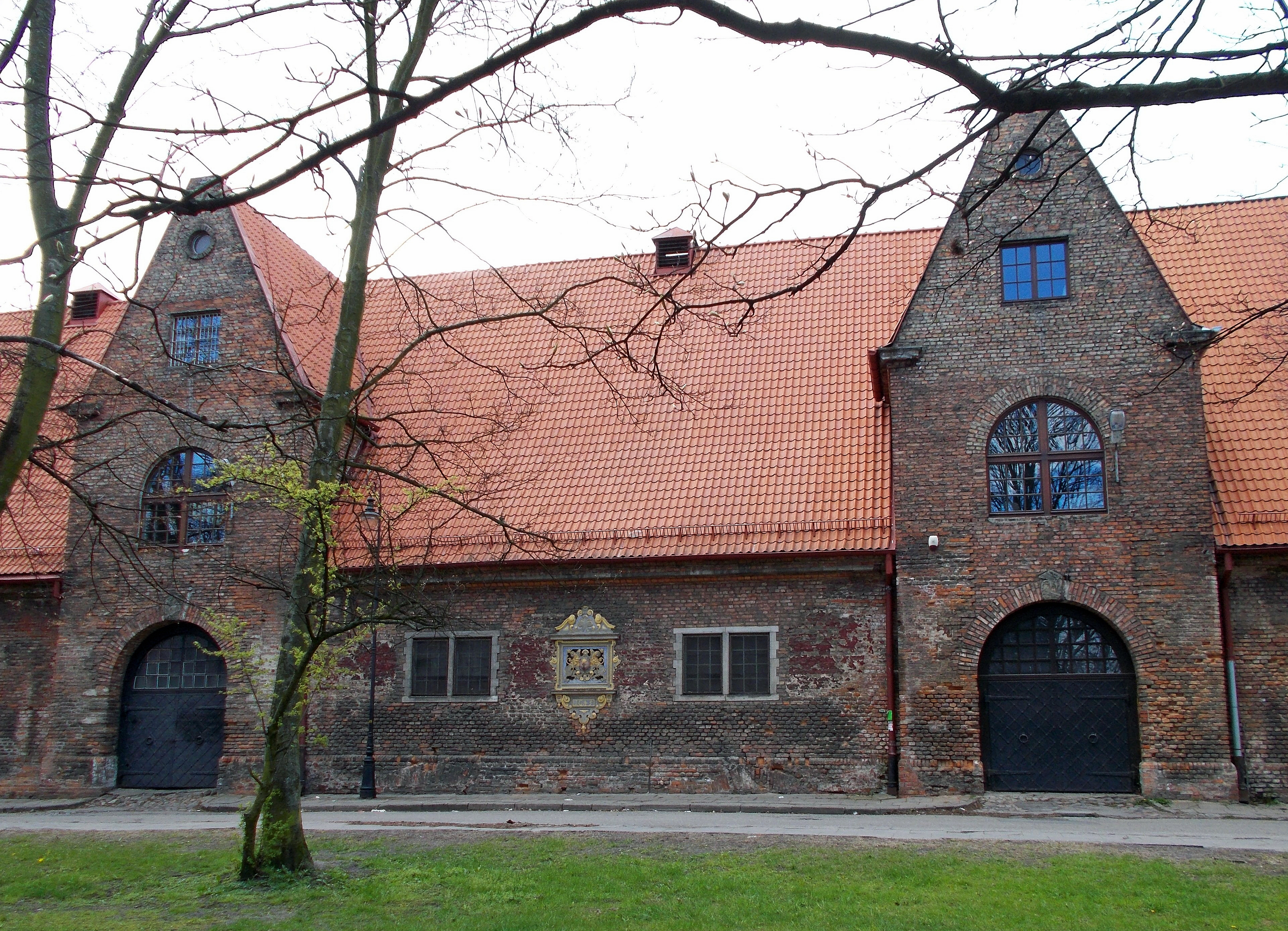 Danzig (Polen), Mała Zbrojownia (Neues Zeughaus), denkmalgeschütztes Objekt